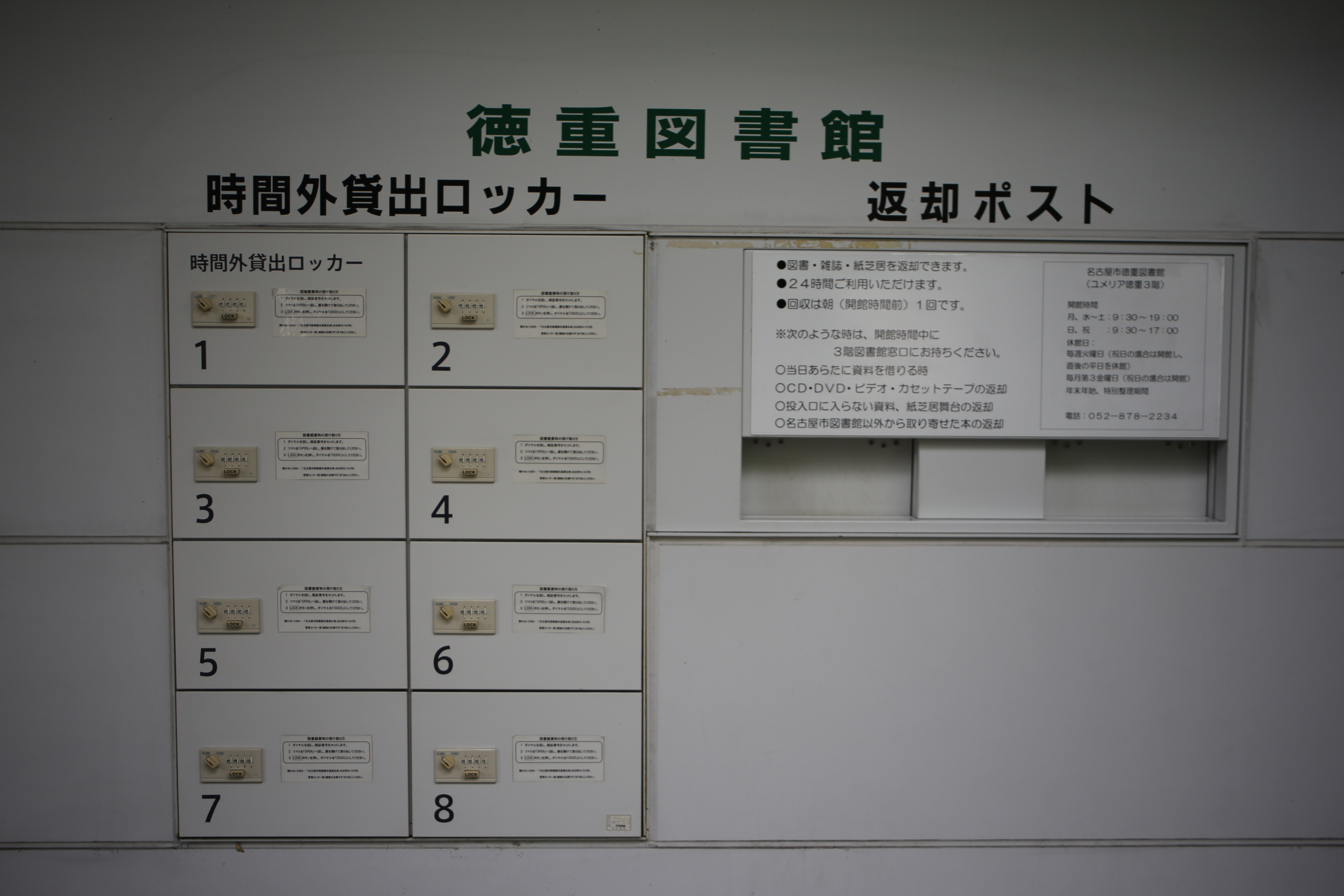 名古屋市緑区の名古屋市徳重図書館返却ポストおよび時間外貸出ロッカー